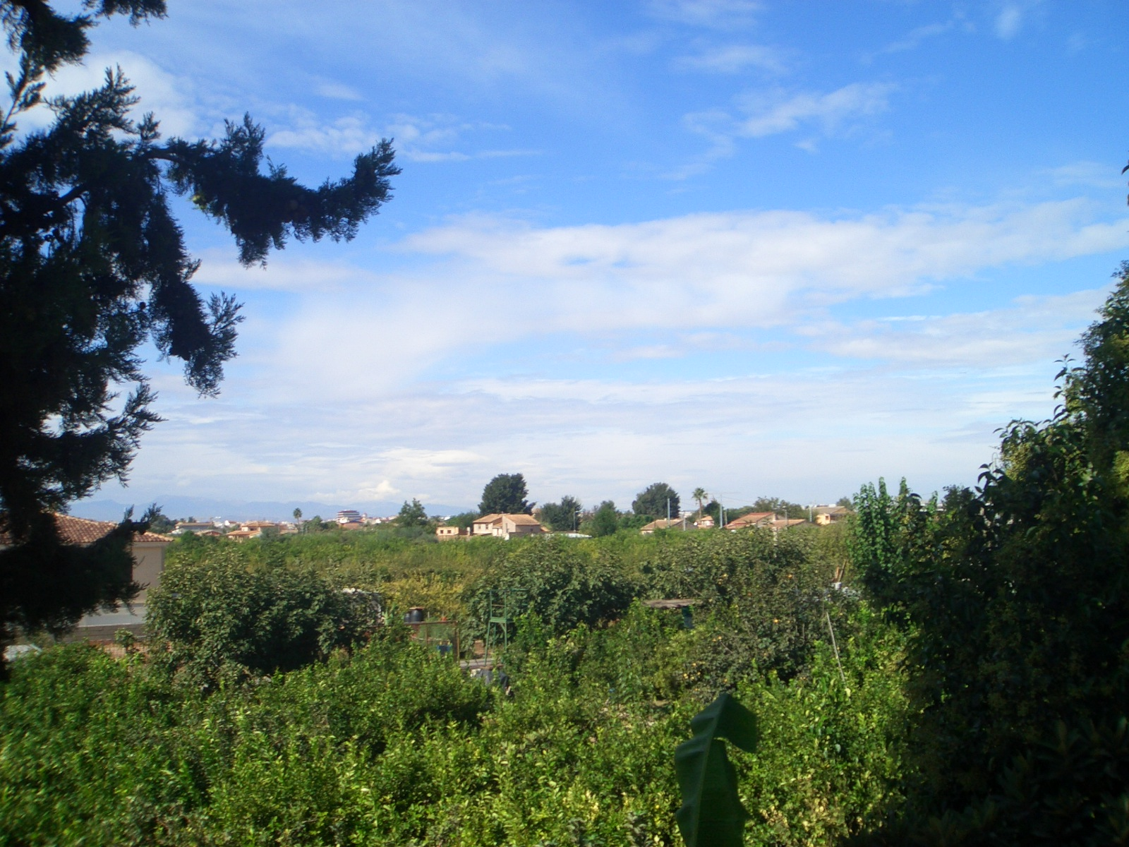 Huerta de Los Dolores. Al fondo se puede distinguir el edificio Mapfre y la torre de la Iglesia. La montaña del fondo es Sierra Espuña.